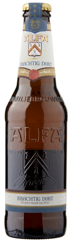 Fles bier